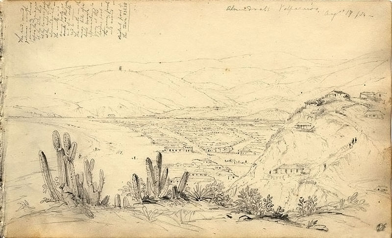 Barrio El Almendral de Valparaíso, Chile, con la Plaza Orrego (actual Plaza Victoria) junto a la playa, en 1834.